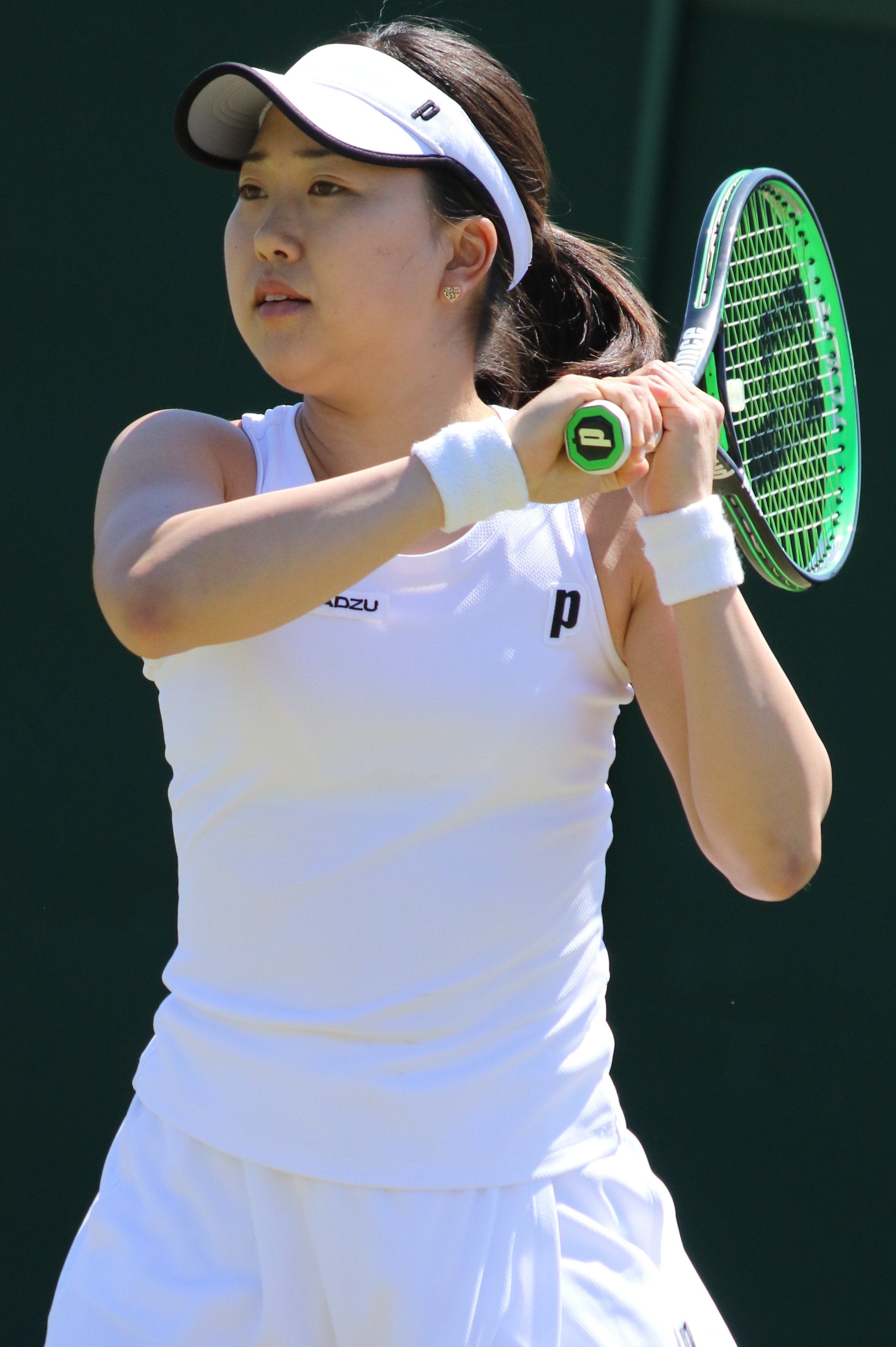 Imanishi WMQ18 (10)